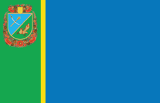 Прапор Петриківського району